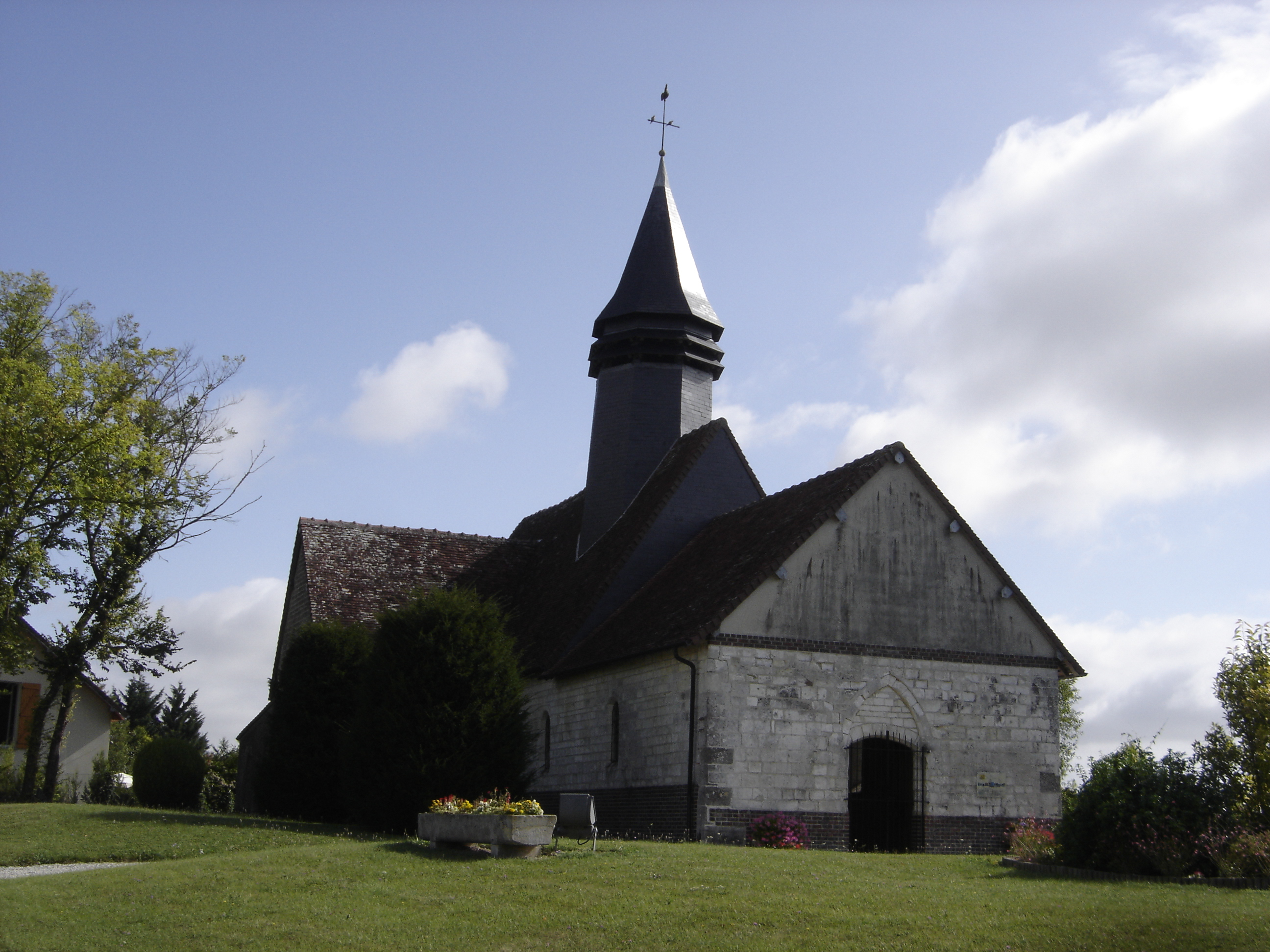 église Saint-Gengoul à Sacey (Commune de Rouilly-Sacey) - Aube - France